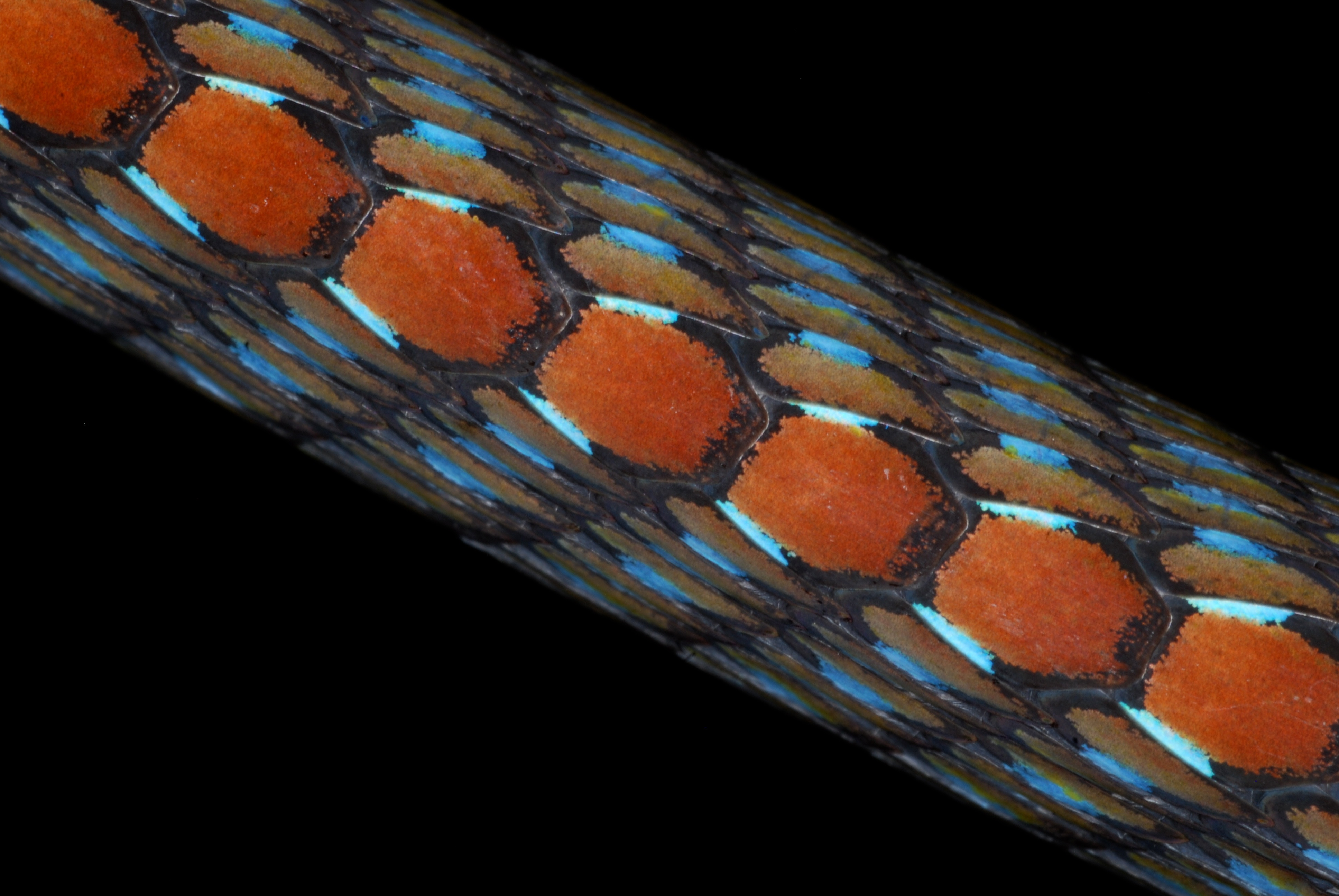 Taman Negara NP, Pahang, MALAYSIA